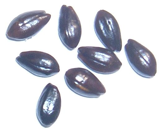 Samen des Sanddorn